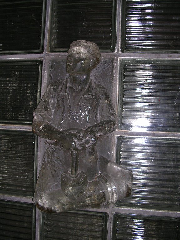 Skleněná tvárnice s reliéfem pracujícího - Kolektivní dům v Litvínově